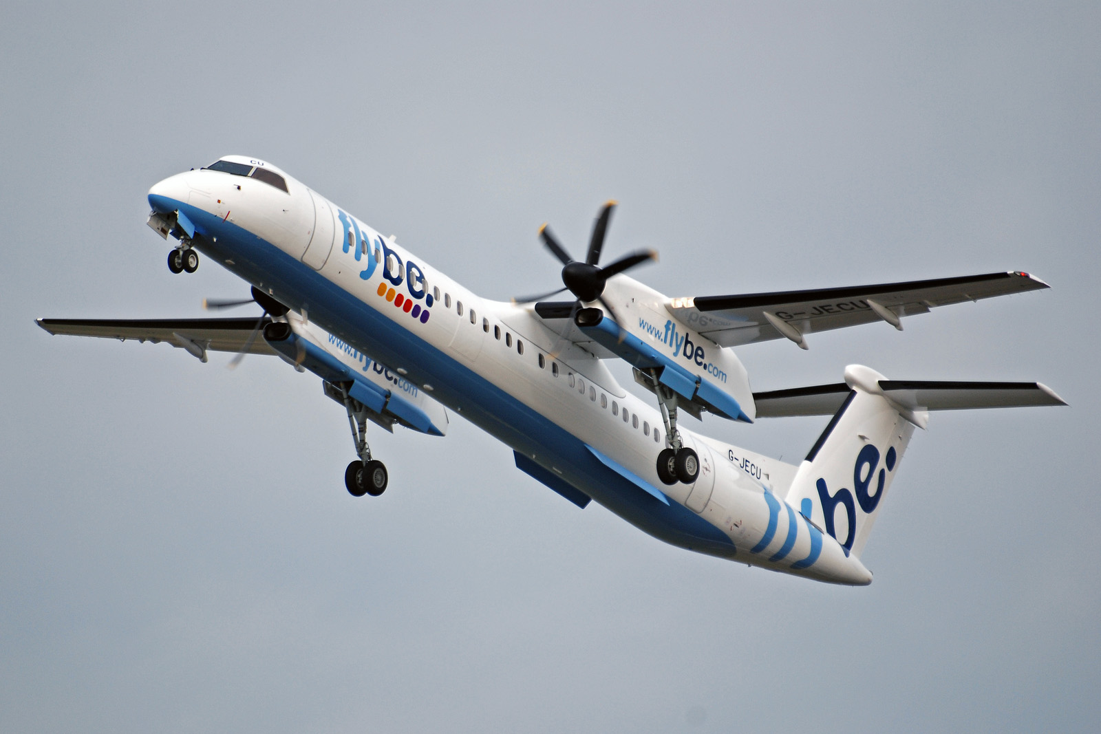 Bombardier Dash 8-Q402 Amsterdam schiphol EHAM (17-02-2007)